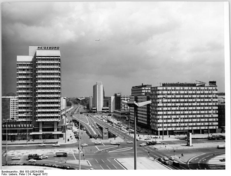 Berlin, Hans-Beimler-Straße ADN-ZB Lieber-24.8.72 Berlin: Blick auf die Neubauten in der Karl-Marx-Allee - Nähe Alexanderplatz. In der Mitte des Bildes sieht man die Hans-Beimler-Straße.